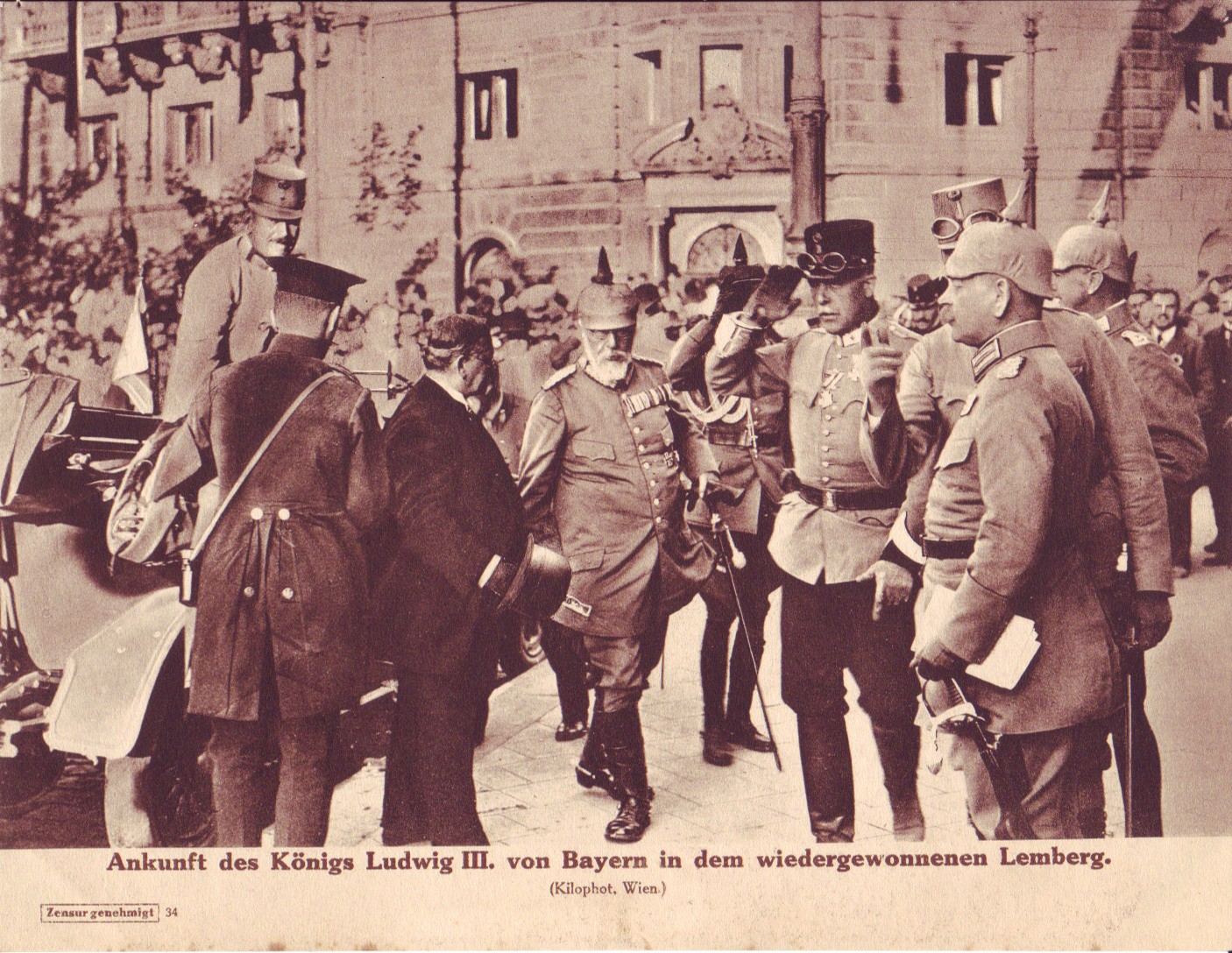 Postkarte